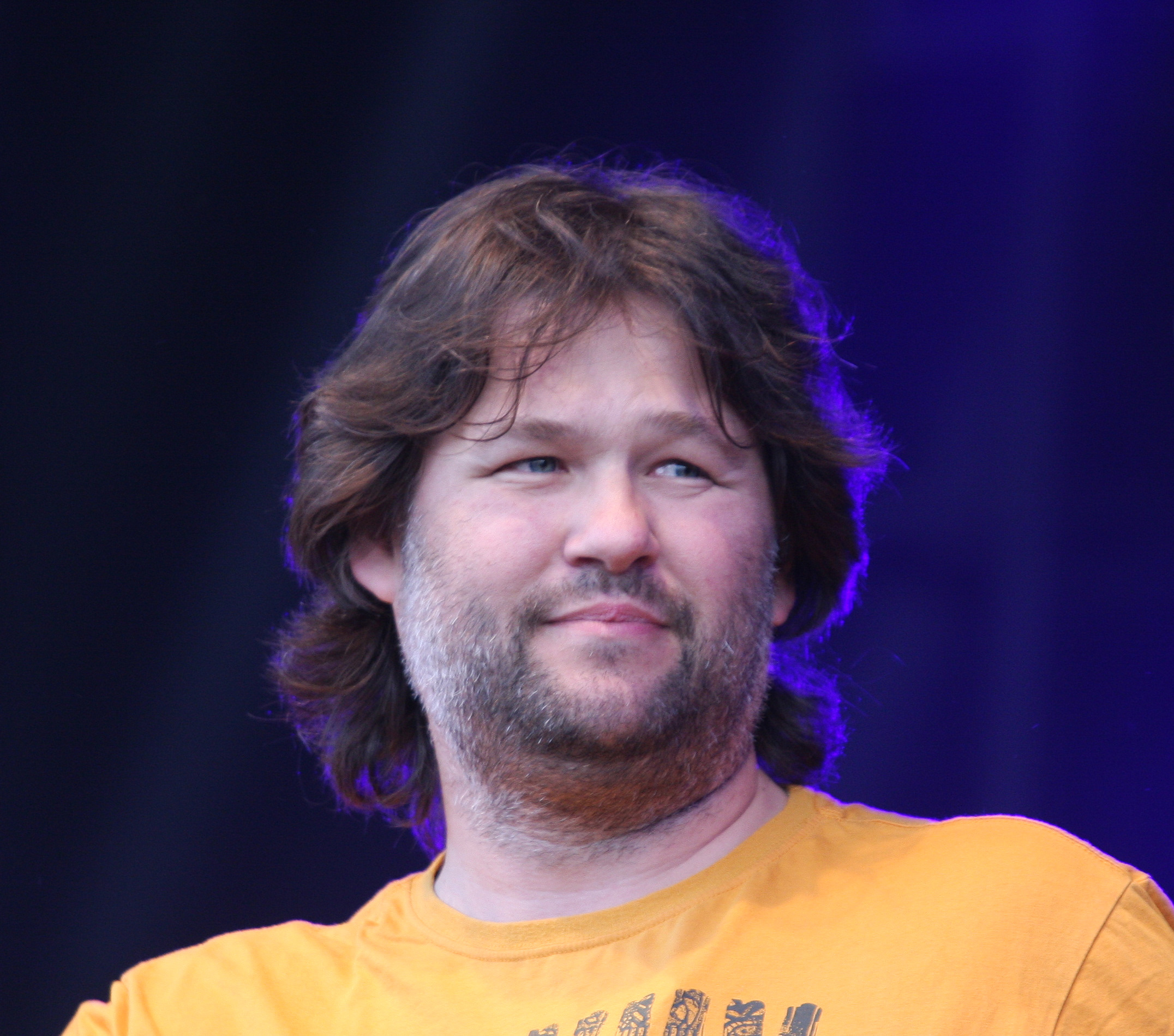 Eskil Brøndbo